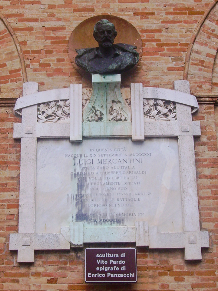 Memorial plaque of poet Luigi Mercantini in Ripatransone.